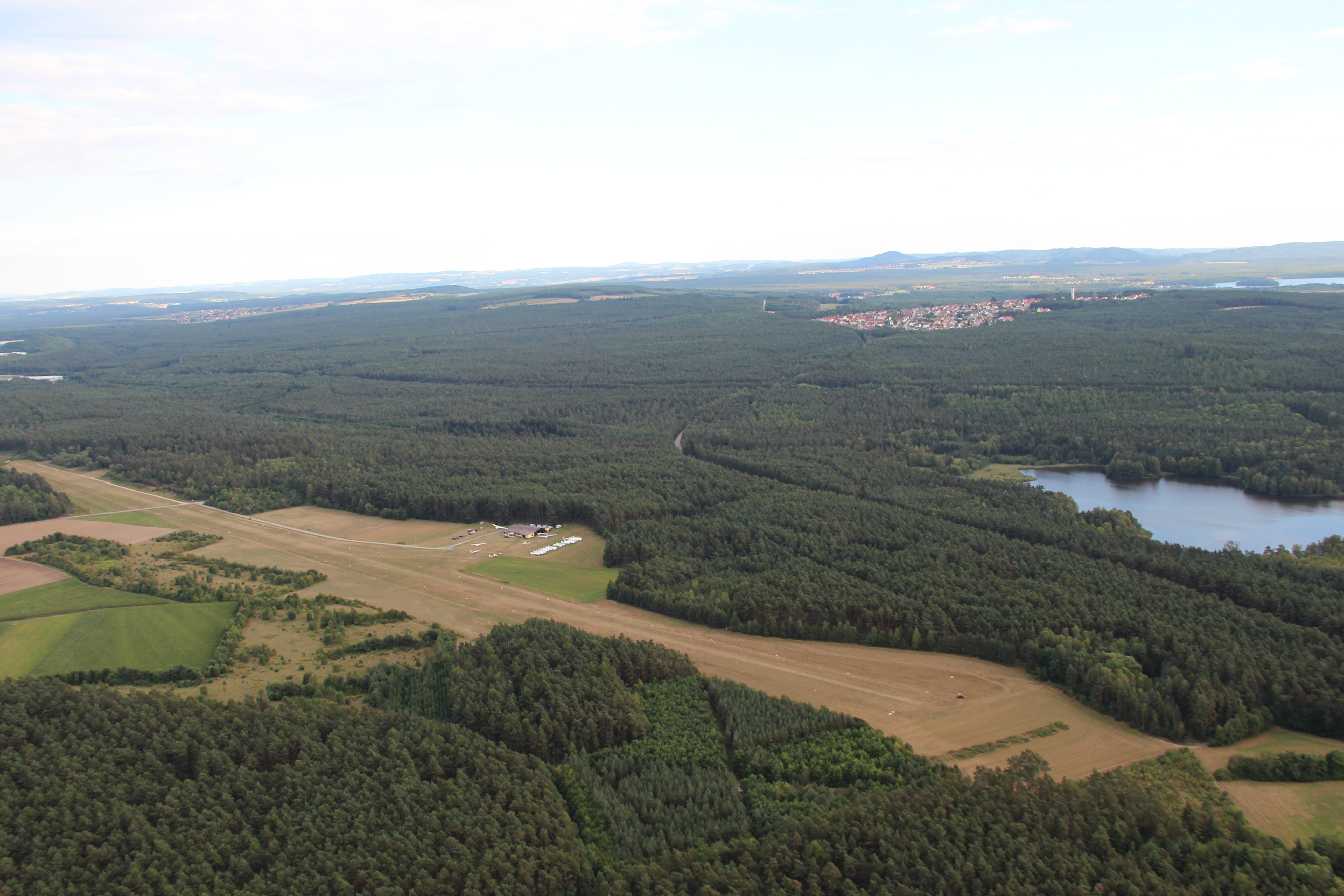 Flugplatz Schwandorf, Landeplatz des Flugsport-Clubs Schwandorf e.V., Landkreis Schwandorf, Oberpfalz, Bayern (2012)